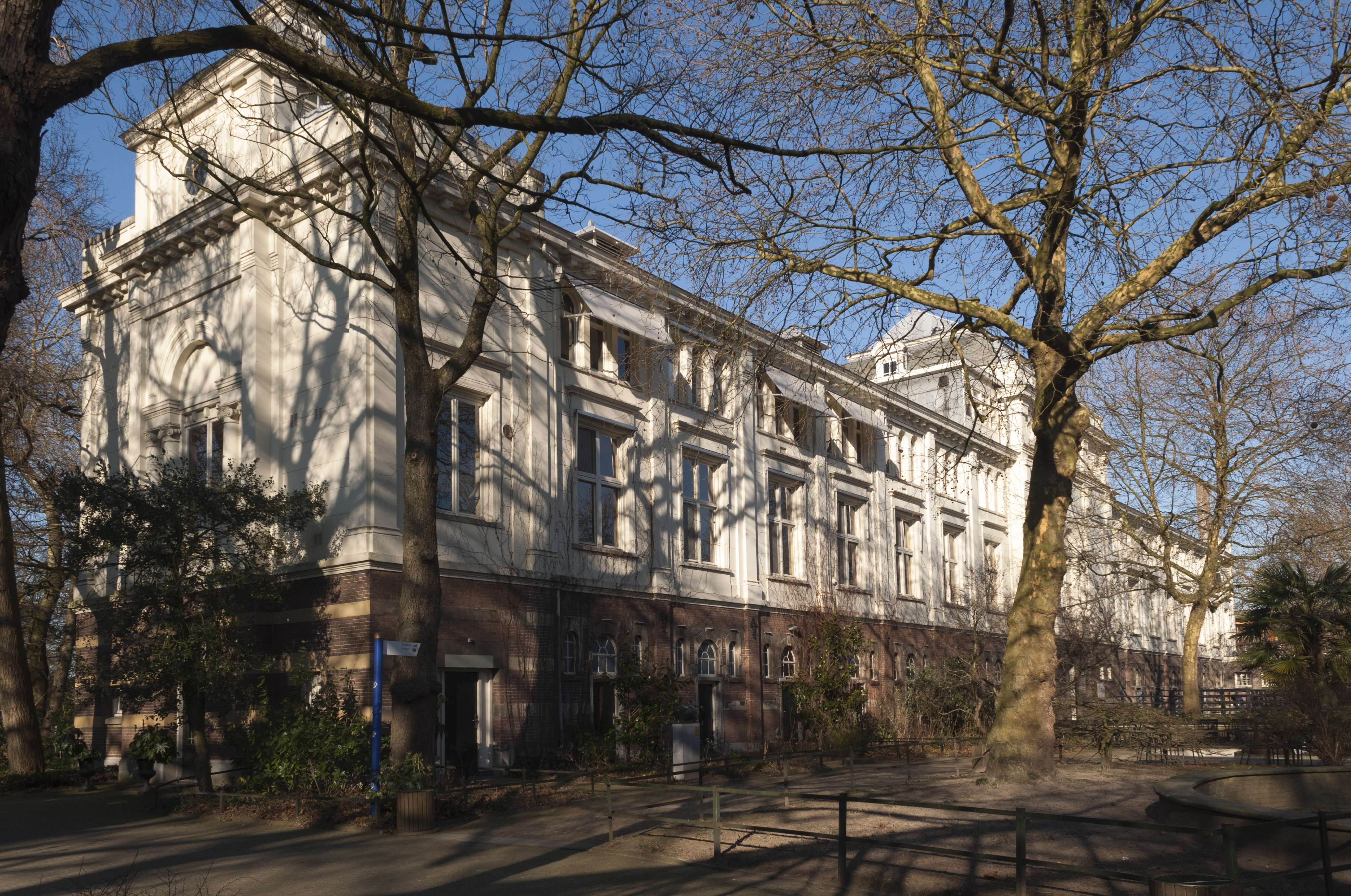 Artis, Amsterdam. Naar eclectisch ontwerp van A.L. van Gendt in 1886 gebouwd voormalig Etnografisch Museum. In de ruime zalen van de etage werd de verzameling etnografica opgenomen. Later is het Etnografisch Museum uit Artis verdwenen en naar het Tropeninstituut overgebracht. In 1923 werd hierin het Zoölogisch Laboratorium van de Universiteit van Amsterdam gevestigd. Het gebouw werd toen door B.J. Ouëndag verbouwd. Er ontstonden een auditorium, collegezalen en een woning voor de amanuensis. Tegenwoordig bevinden zich op de verdiepingen diverse kantoren van Artis, het Artis-atelier en een modern nachtdierenverblijf op de begane grond. Het museum staat op de oostelijke helft van het park, met de korte zijgevel langs de noordgrens en steekt dwars het park in. Voordien stond hier het pakhuis "De Volharding", sedert 1867 als runderstal in gebruik.